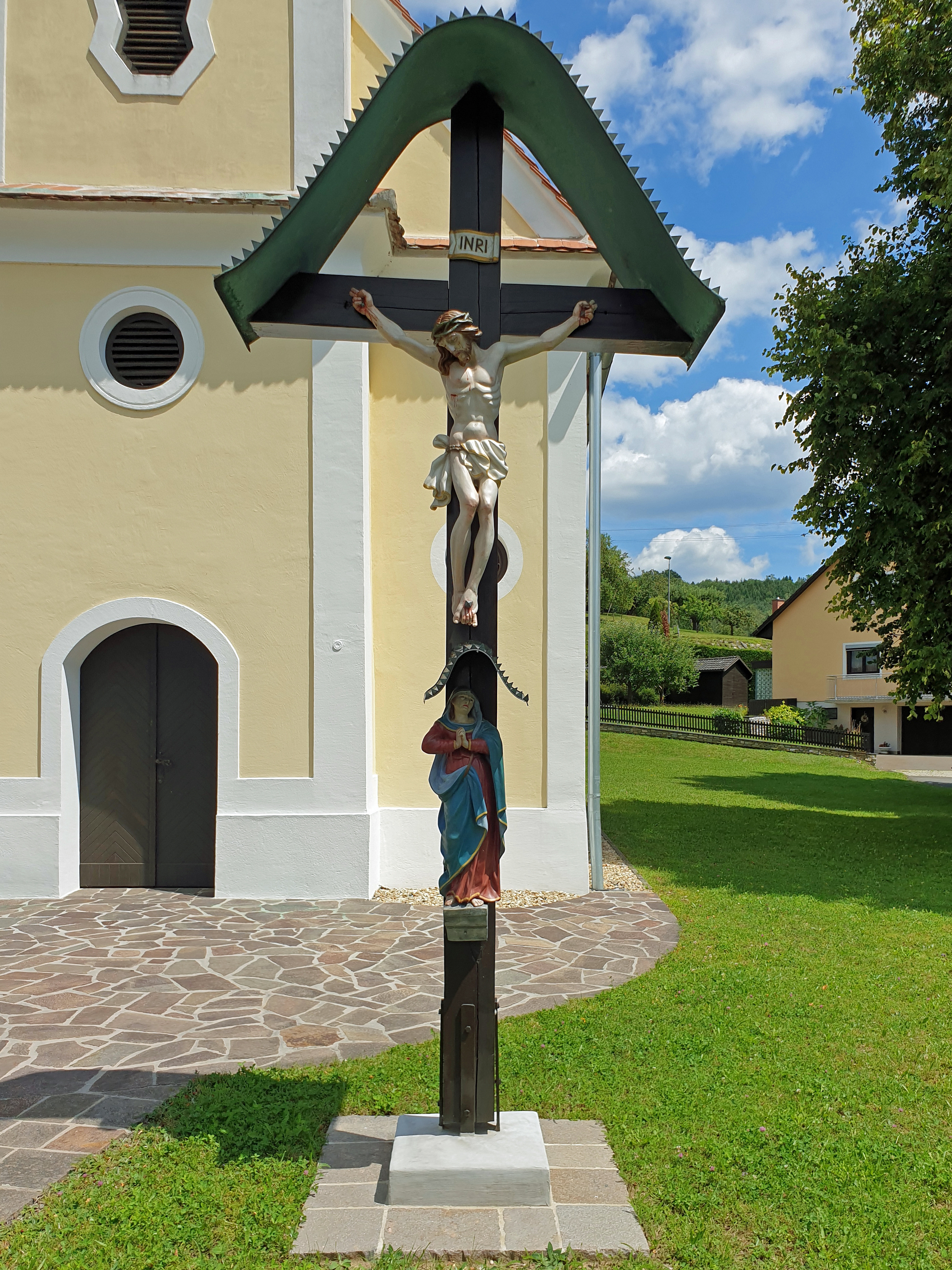 Ortskapelle hl. Johannes d. Täufer